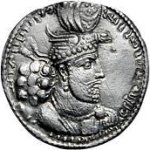 Pièce du règne de Hormizd II